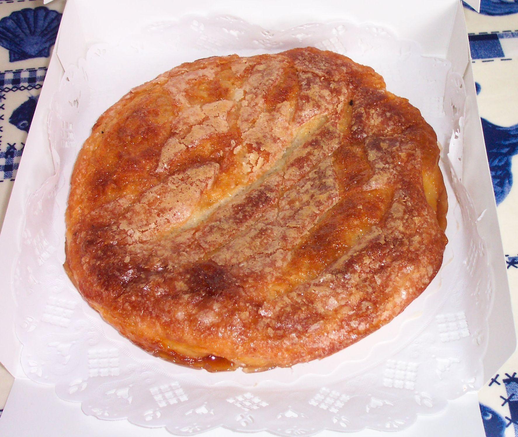 Véritable Kouign Amann de Douarnenez